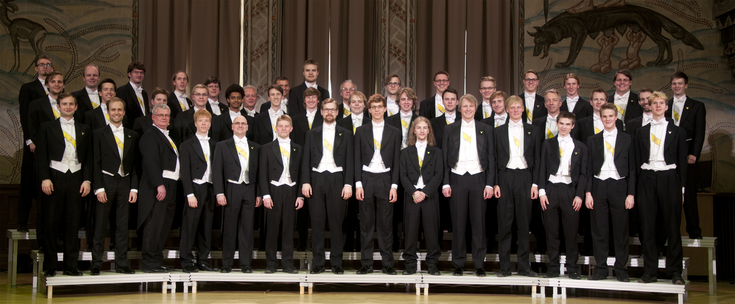 Linköpings Studentsångare våren 2012